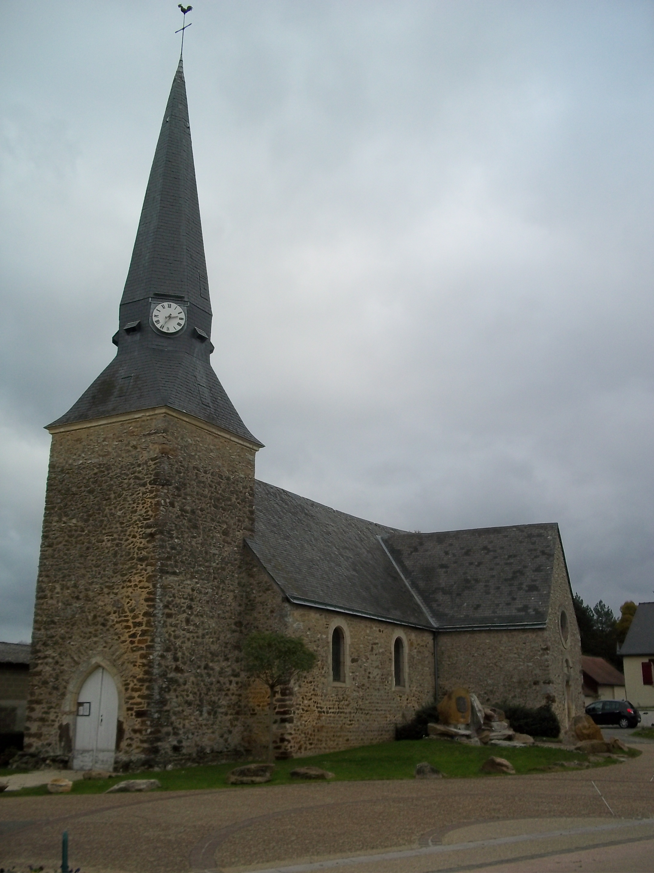 L'Eglise